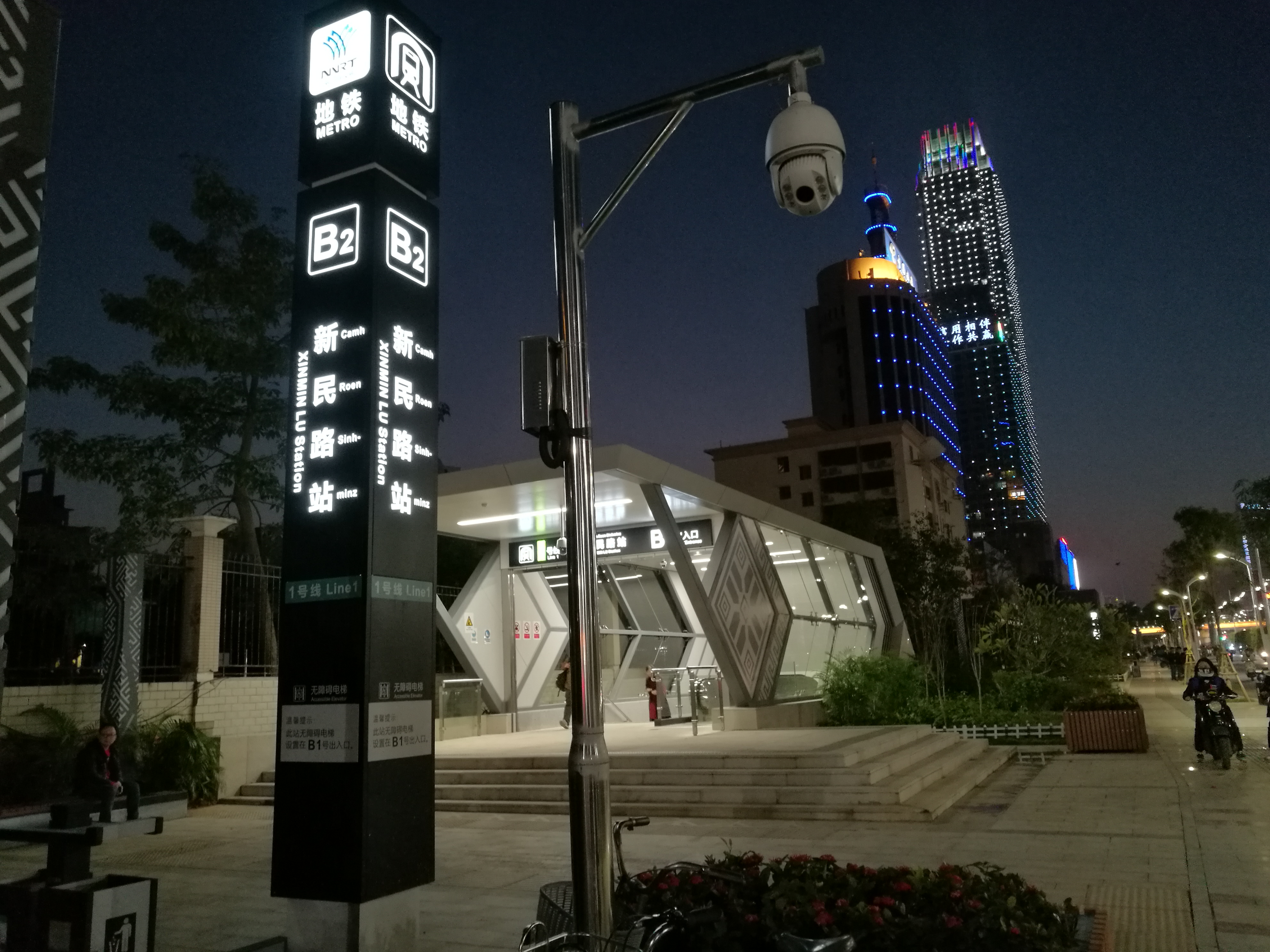 南宁轨道交通新民路站